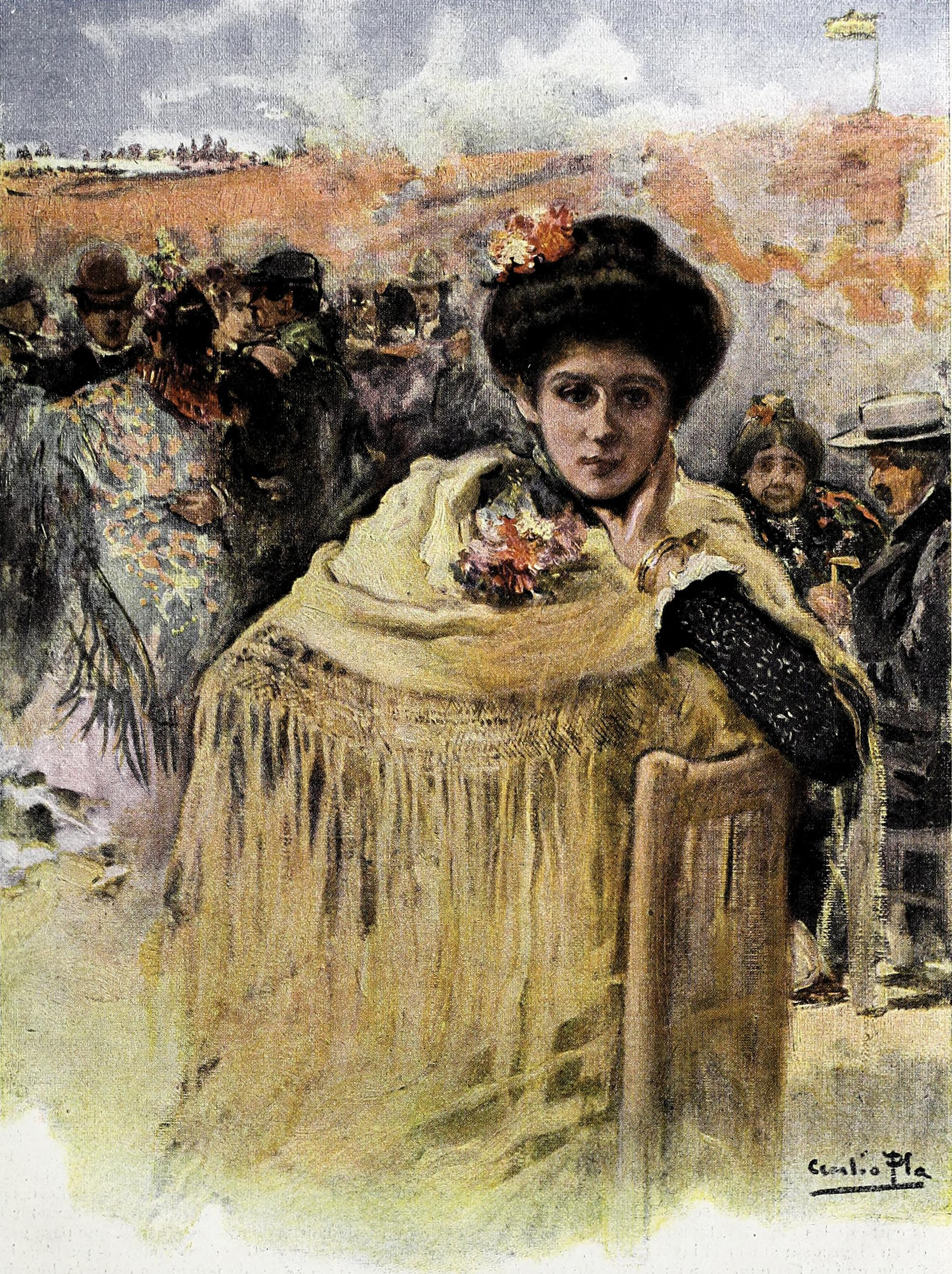 Figuras teatrales II. El santo de la Isidra.